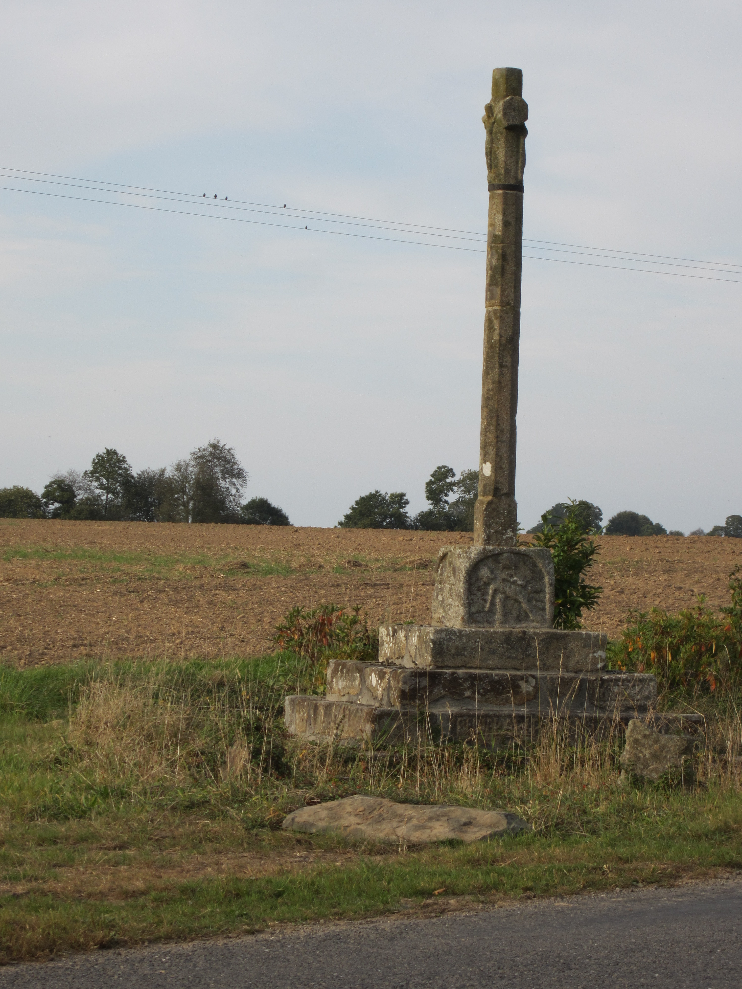 Heussé, Manche